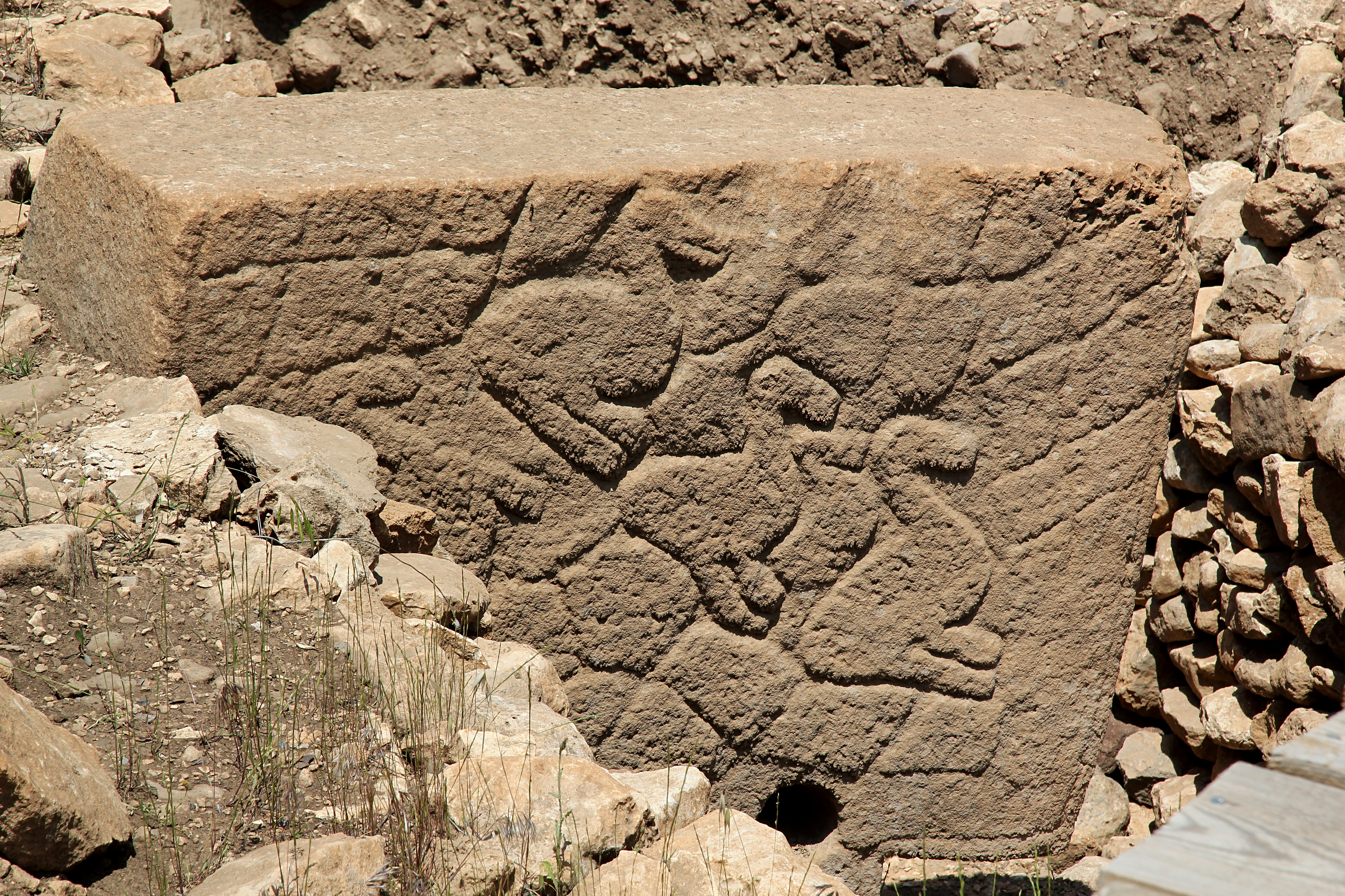 Göbekli Tepe, Siedlungshügel bei Şanlıurfa, Südosttürkei, Anlage C Pfeiler 12